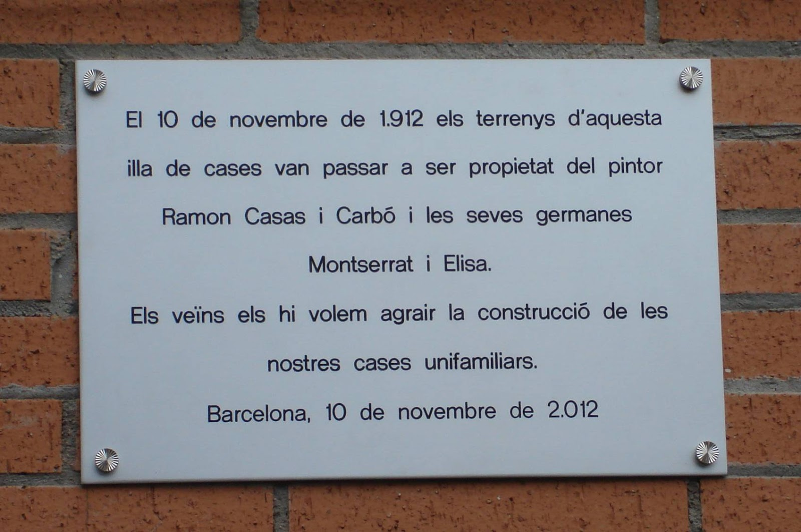 Foto de la placa de commemoració del centenari situada al passatge de Santa Eulàlia cantonada al carrer d'Escòcia.